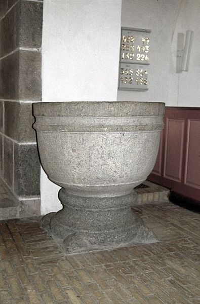 Rybjerg Kirke, (Skive Kommune), Døbefont